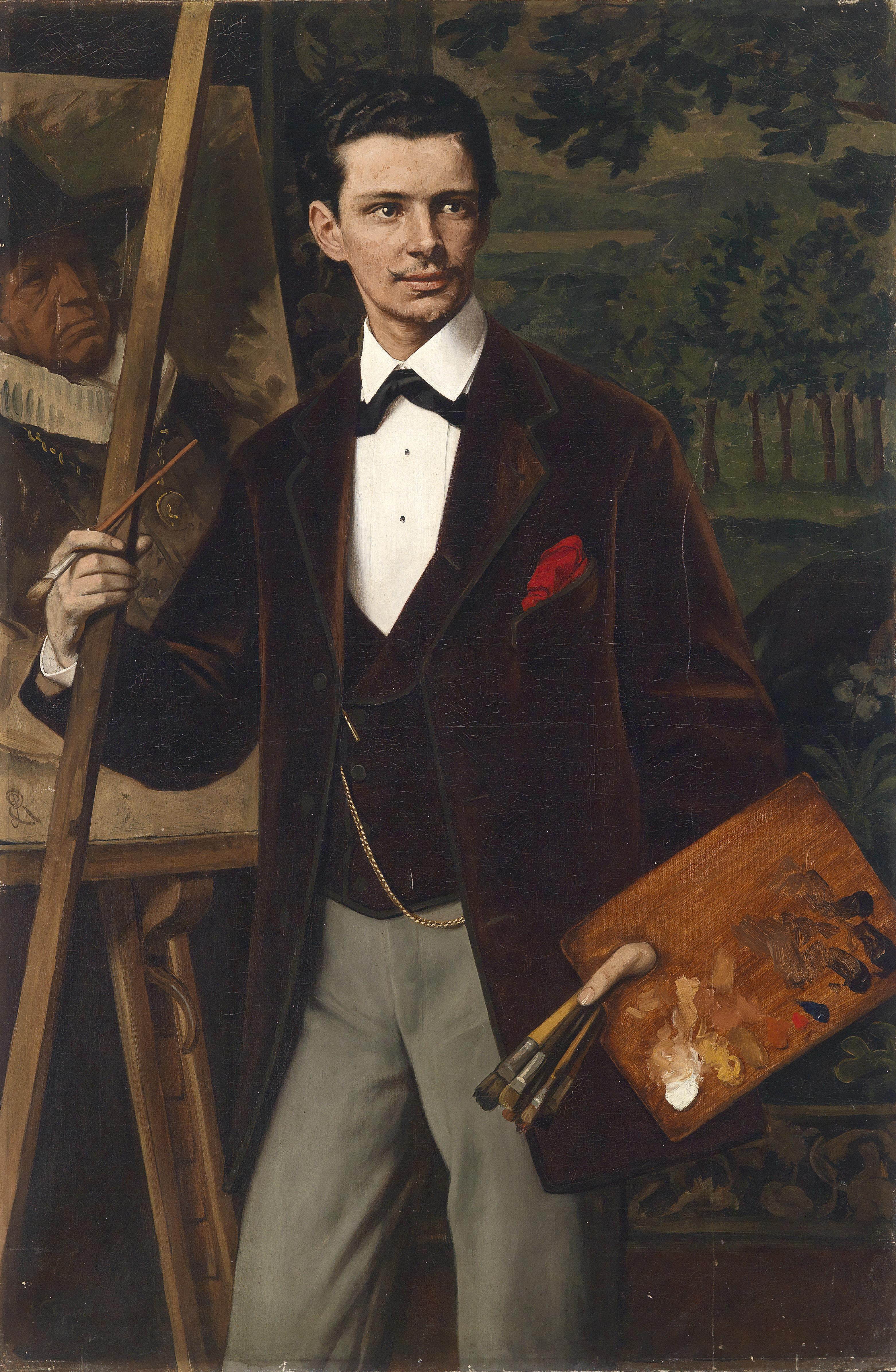 Bildnis eines Malers vor der Staffelei, signiert, datiert E. Gebhardt 1881